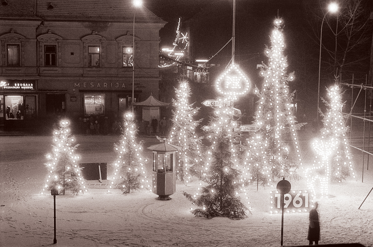 Praznično okrašen Glavni trg - novoletne smreke